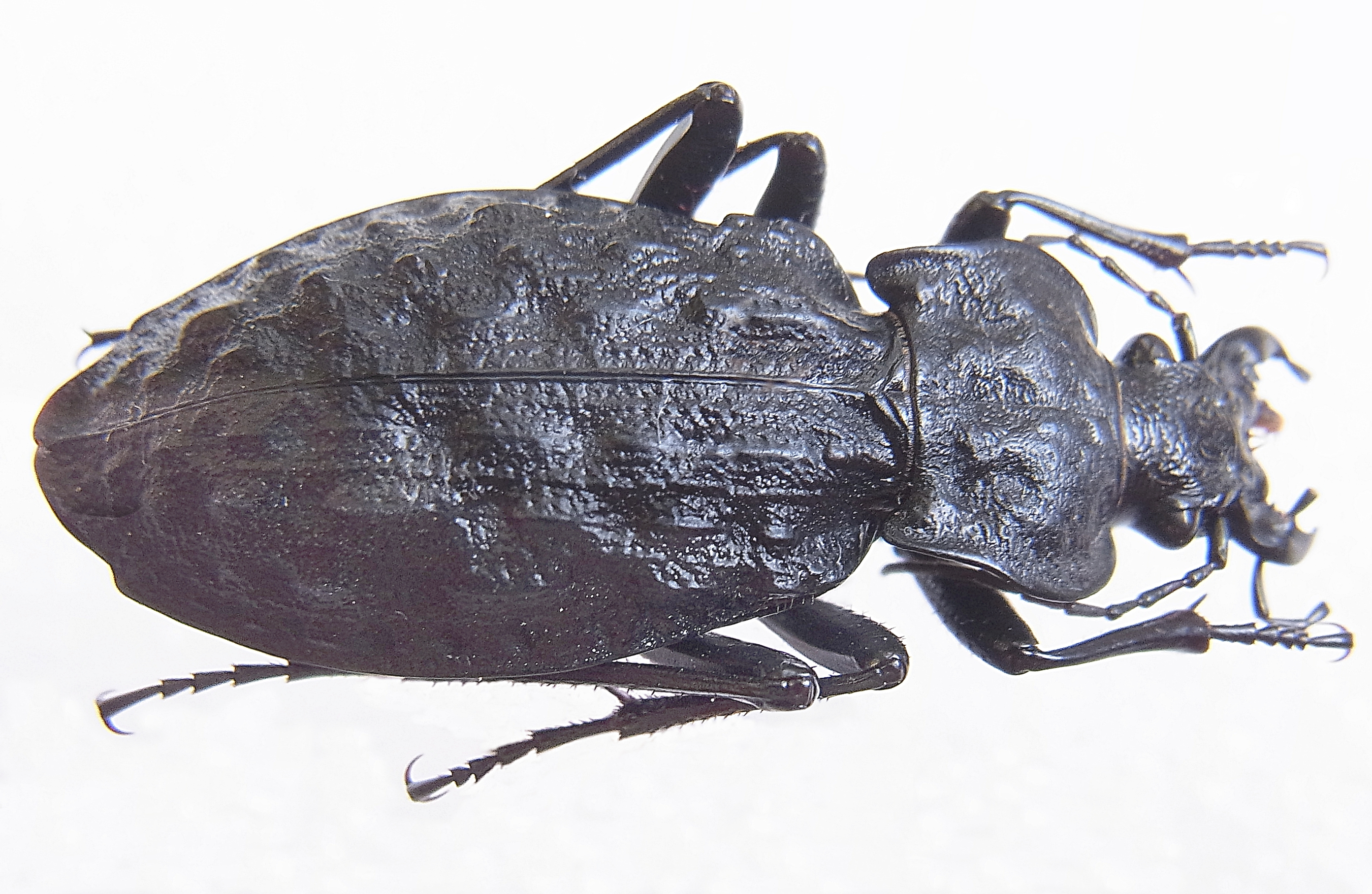 Carabus nodulosus from Hungary, Bakony-Bergland, nahe Zirc, aus der Sammlung desMuseums Zirc, Zettel wegretuschiert